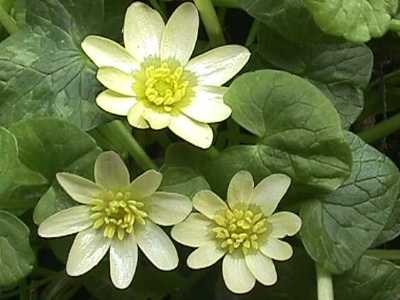 Ranunculus ficaria 'Salmon's White'